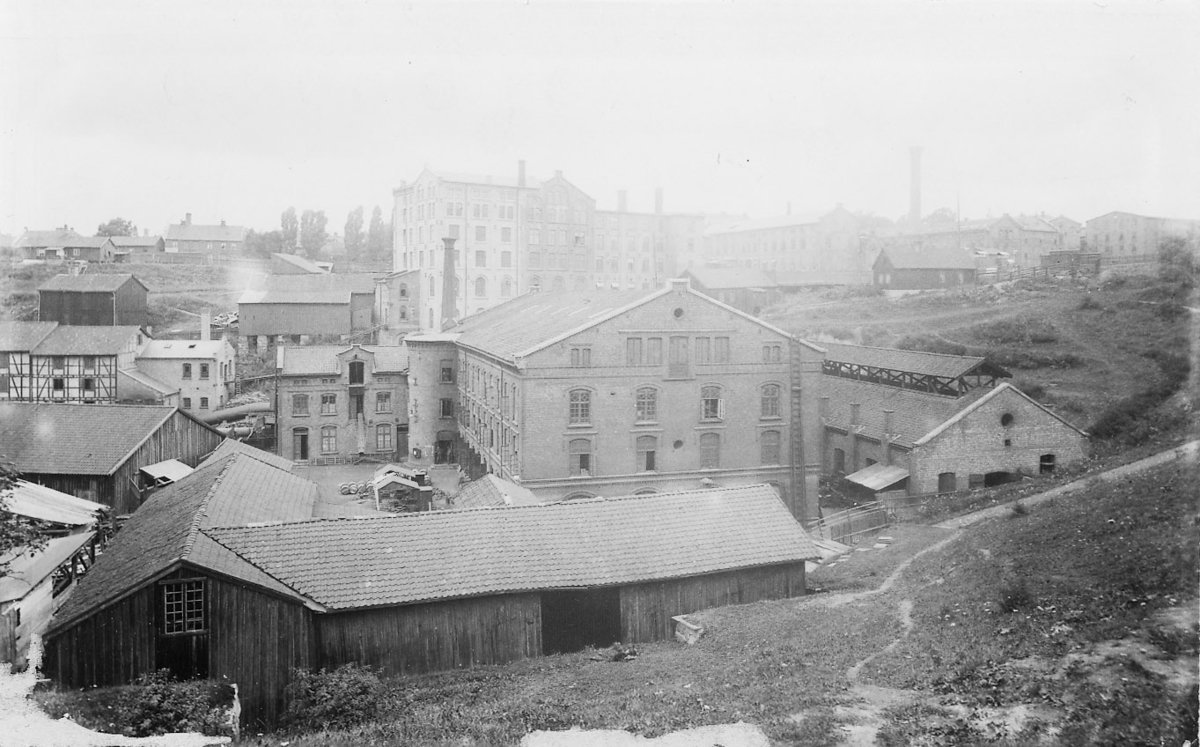 Den Norske Hesteskosømfabrik (i forgrunnen), Hjula Væverier (i bakgrunnen), Hønse-Lovisas hus (til høyre)